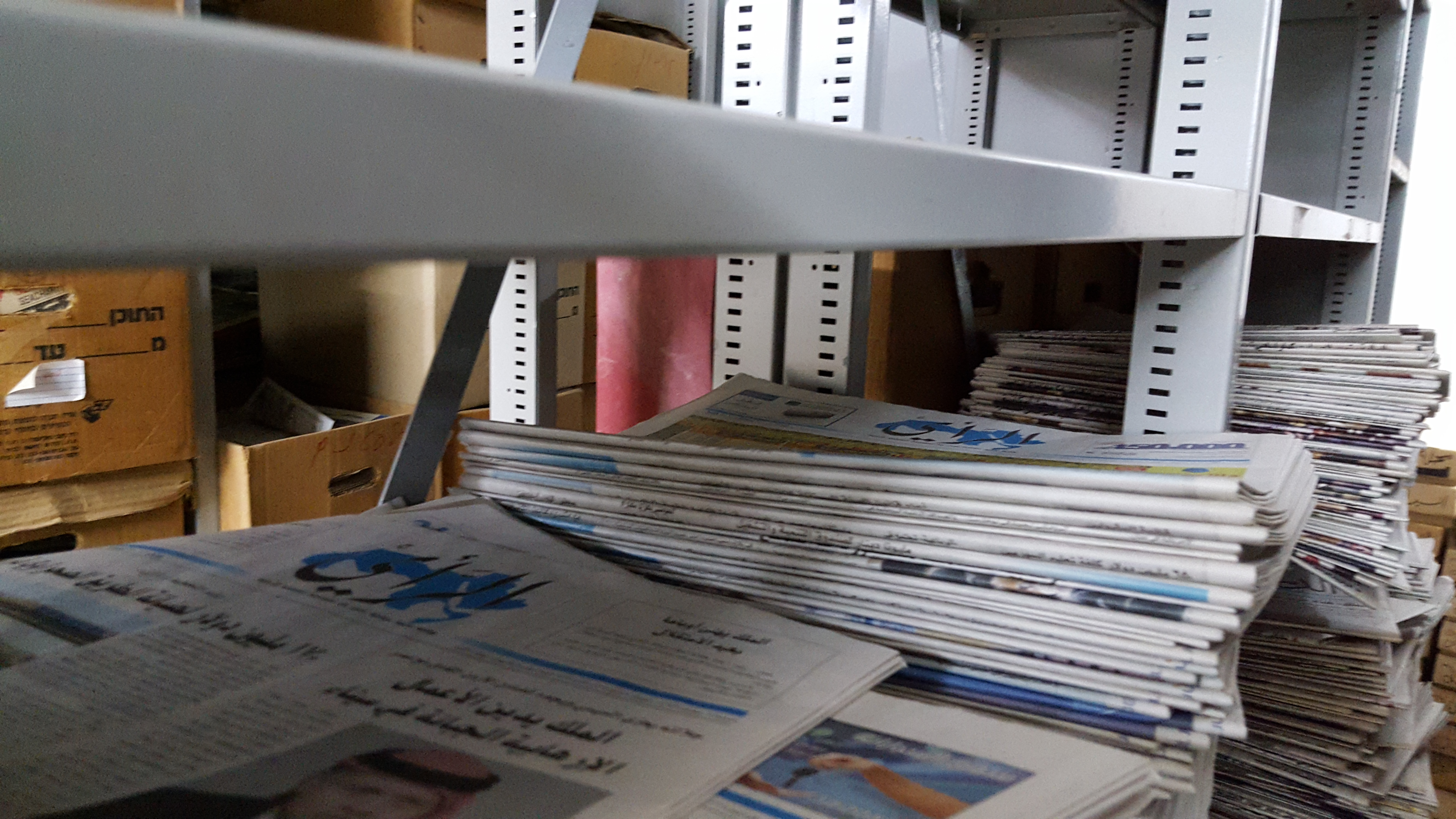 A collection of newspapers from Jordan (Al-RAI). The collection found in the Moshe Dayan Center for Middle Eastern and African Studies